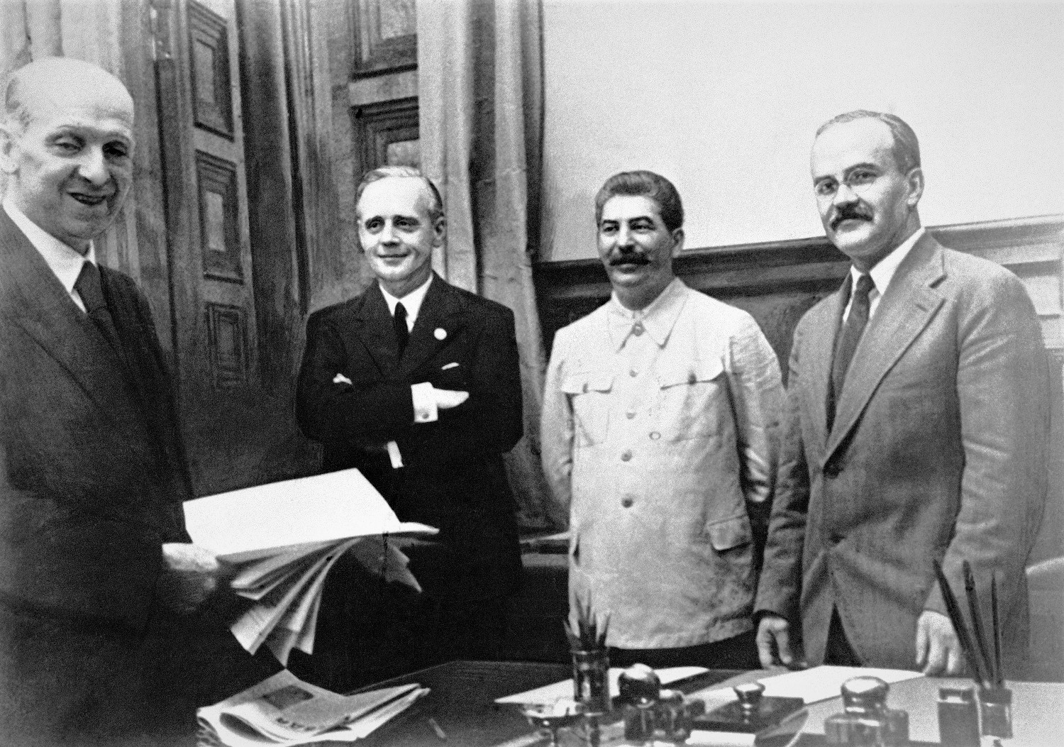 На фото слева направо заведующий юридическим отделом МИД Германии Фридрих Гаусс, министр иностранных дел Германии Иоахим фон Риббентроп, секретарь ВКП(б) Иосиф Сталин, министр иностранных дел СССР Вячеслав Молотов